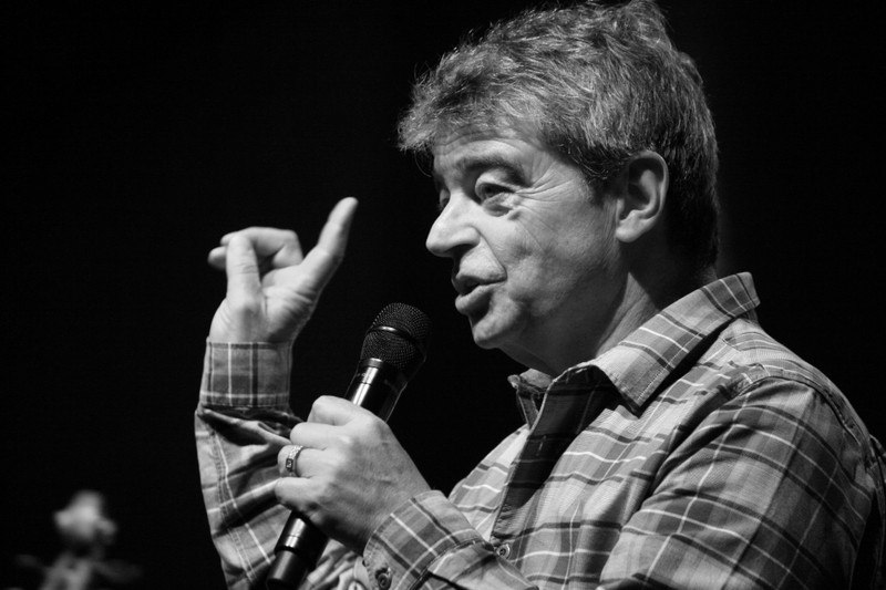 SR-Moderator Peter Kleiß beim St.Ingberter Jazzfestival